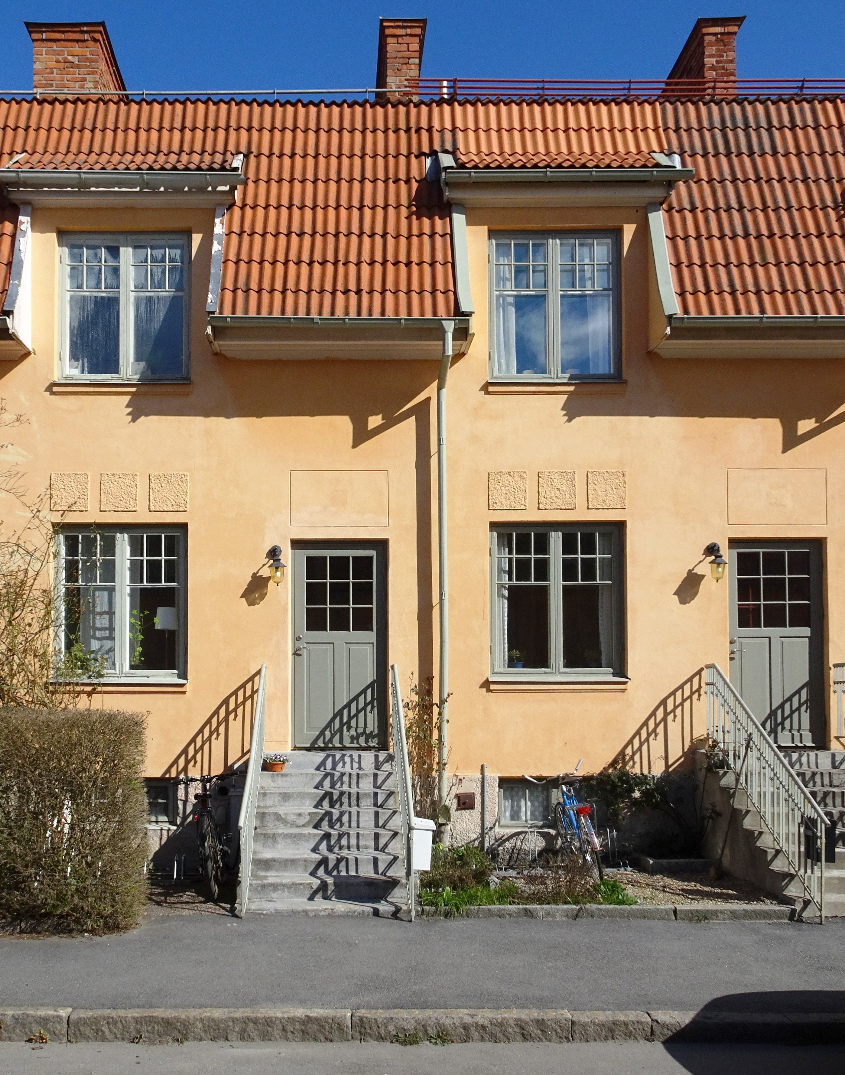 Gamla Enskedets radhus vid Margaretavägen (nr 43 och 45), arkitekt Victor Bodin, byggnadsår 1909.